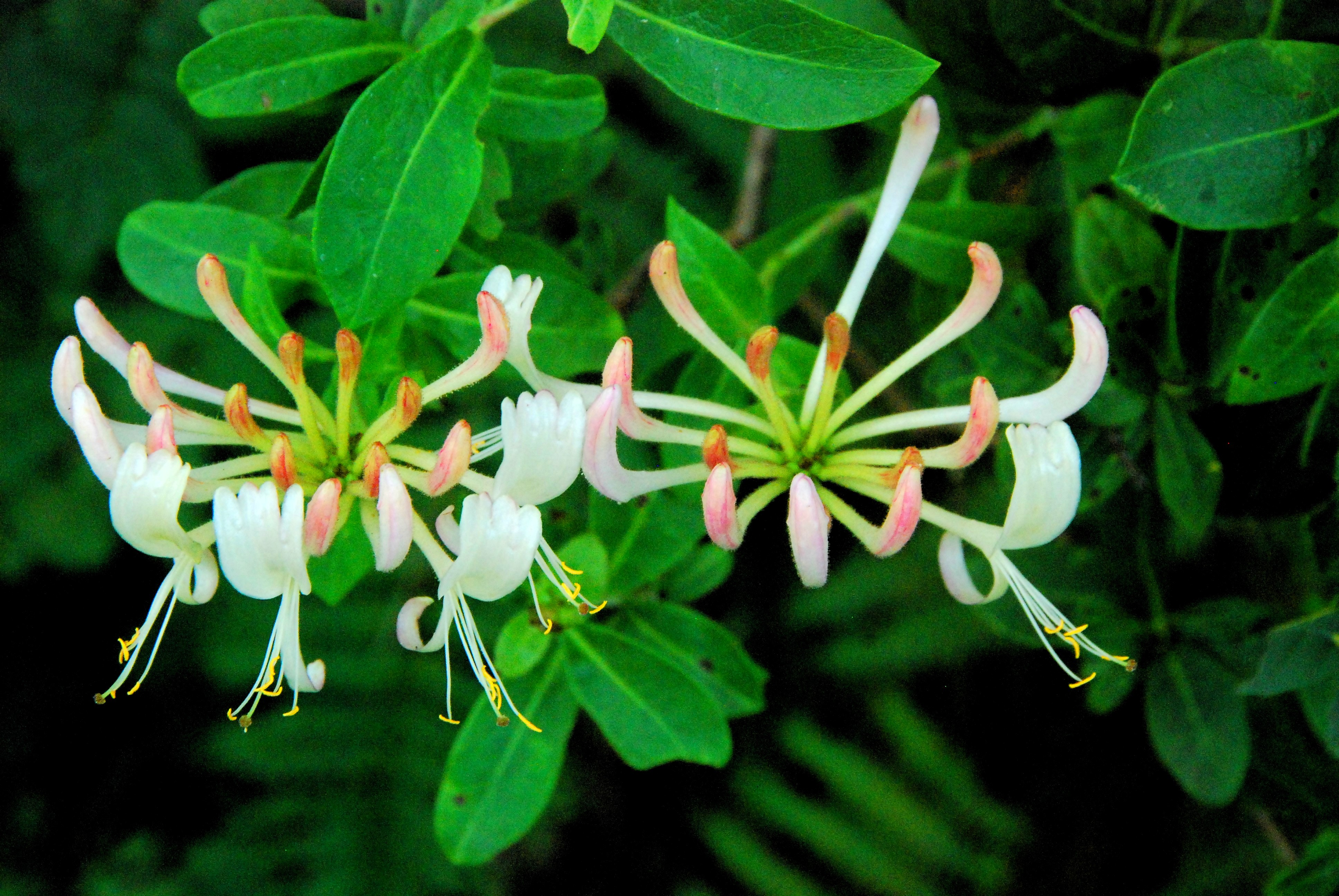 Aretxabaletako Urkulu uharka. Atxapar loreak